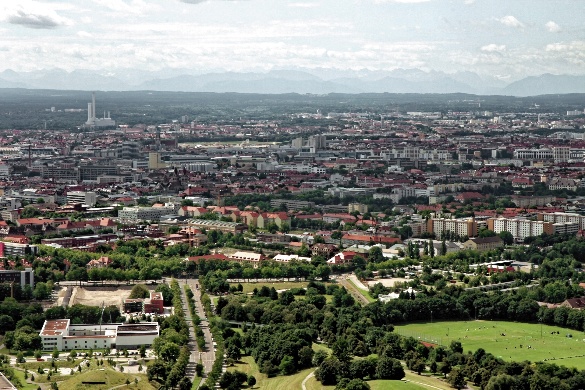 Wikipedia im Landtag – Bayern 17. bis 19. Juli 2012 in München Dieses Foto wurde im Rahmen des Projektes „Wikipedia im Landtag“ erstellt.